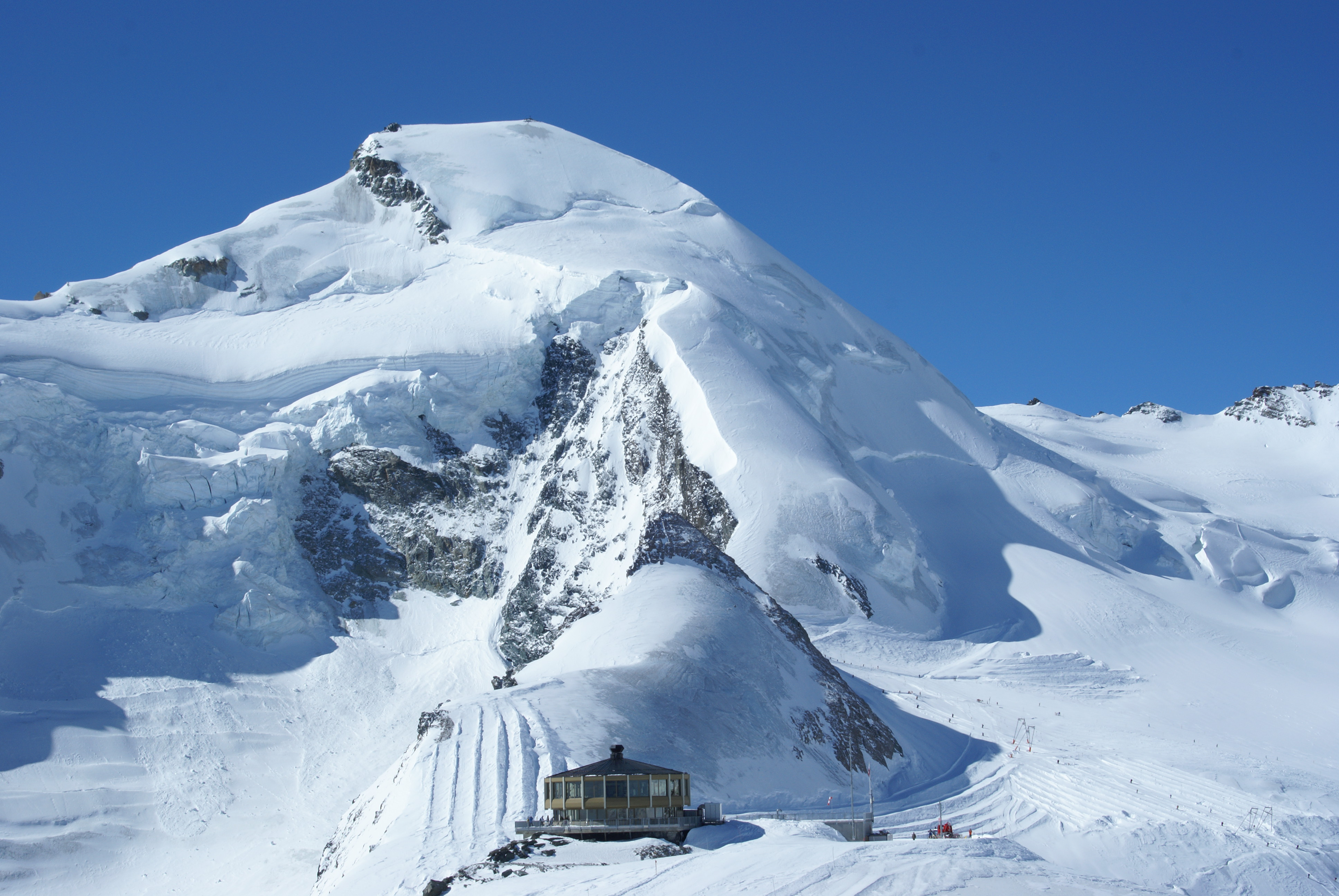 The Top, Mittelallalin, 3500m